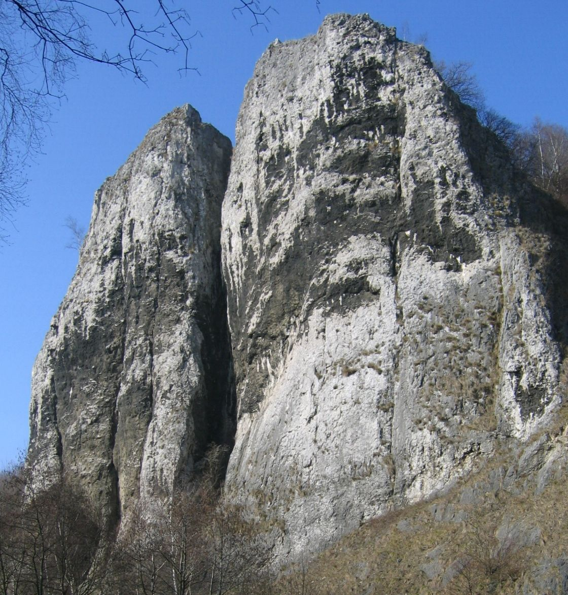 Massenkalk-Klippen "Pater und Nonne" im Tal der Lenne an der Bundesstraße 7 in Iserlohn-Letmathe, Naturdenkmal.